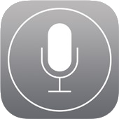 Siri